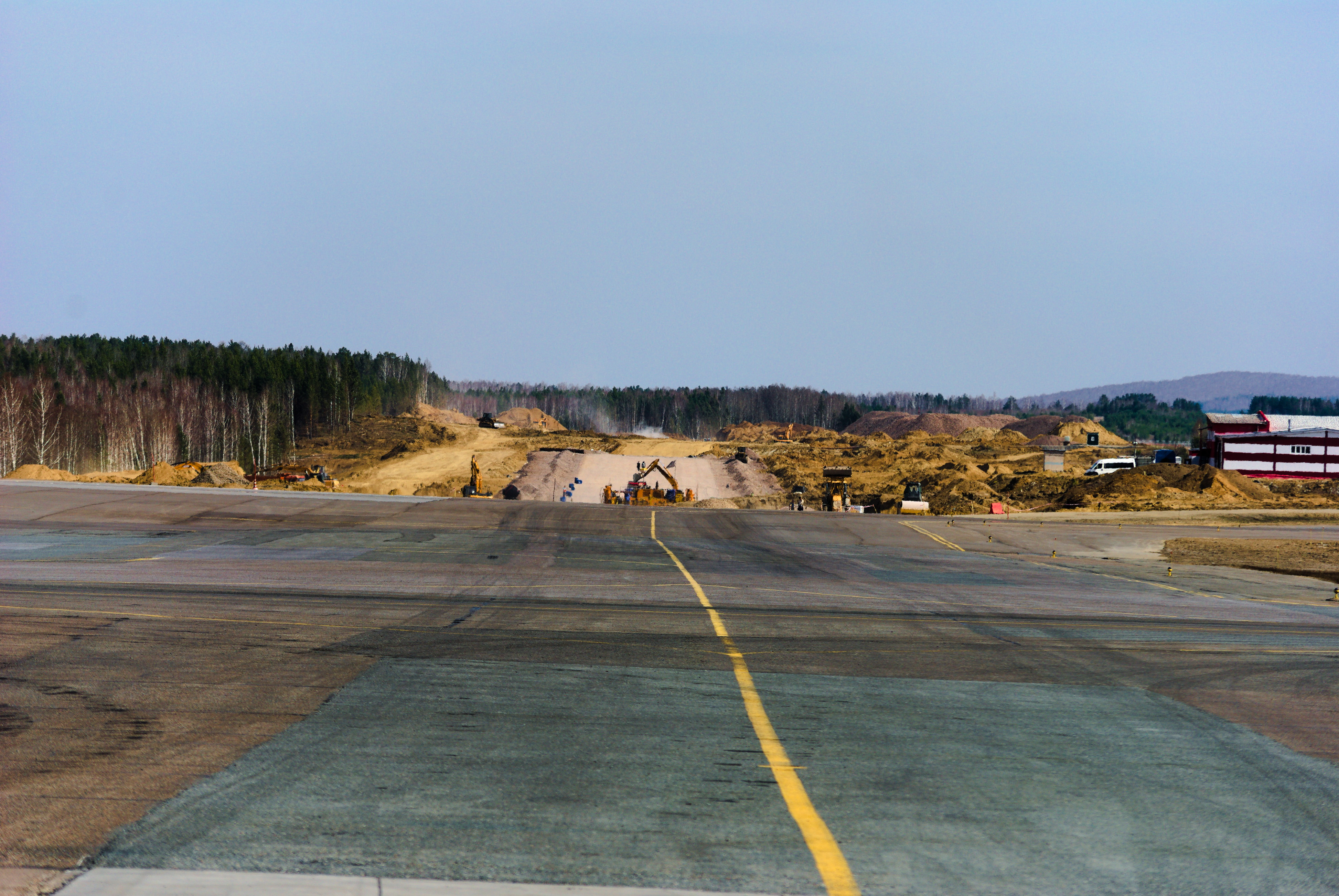 Строительство магистраьной рулёжной дорожки в аэропорту Красноярска.